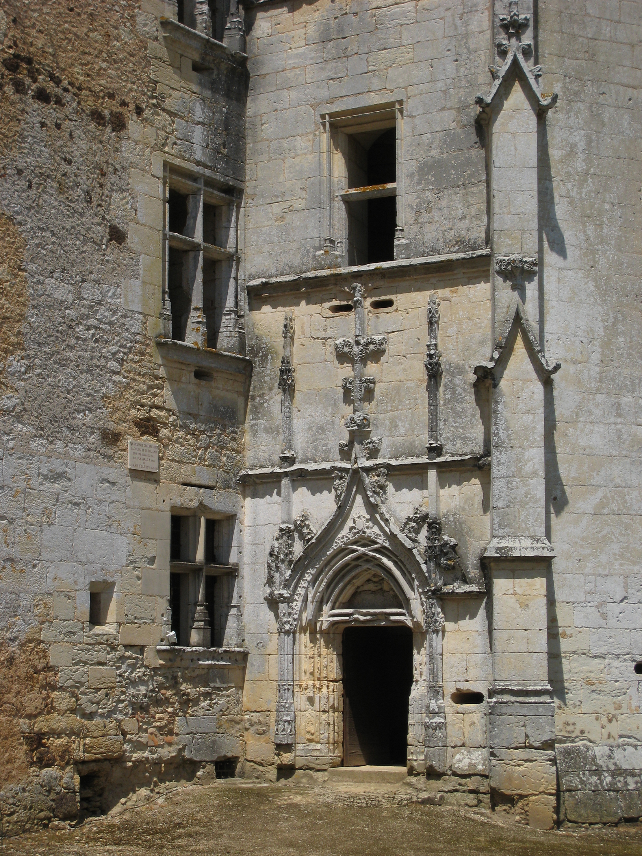 Château de l'Herm in the village of Rouffignac-Saint-Cernin-de-Reilhac, Département Dordogne/France.